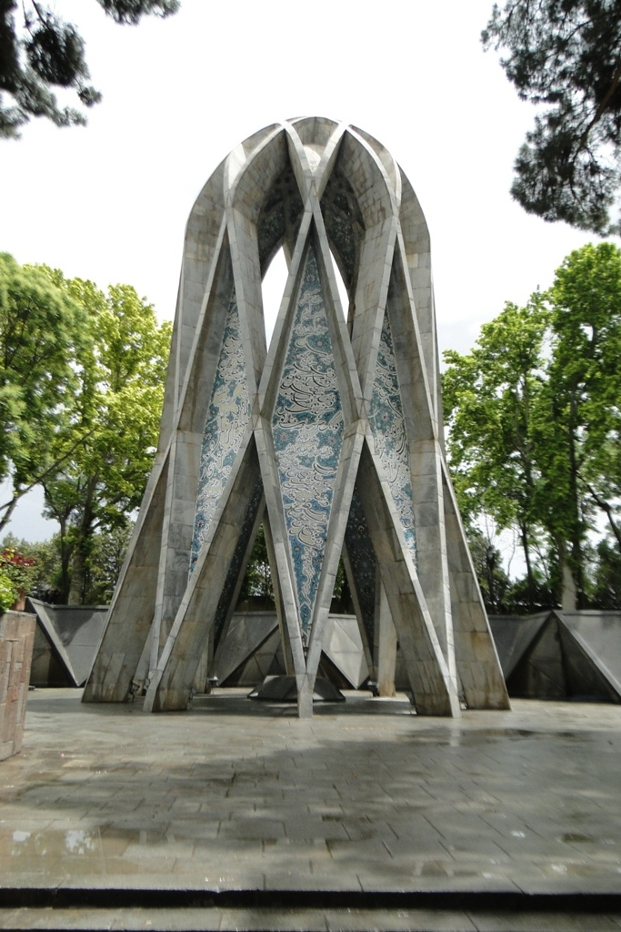 آرامگاه عمر خیام